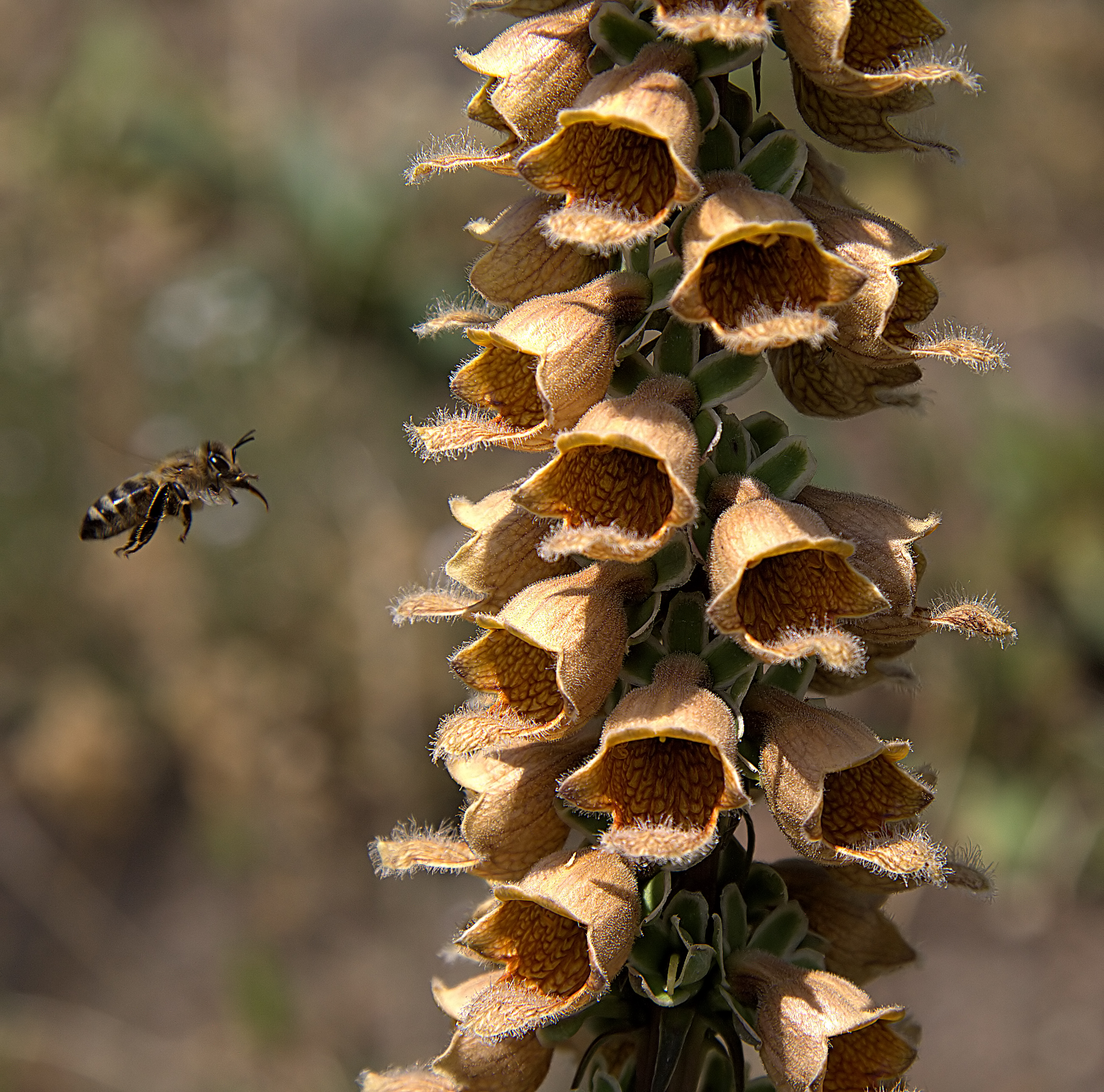 Digitalis ferruginea at Botanischer Garten Berlin.